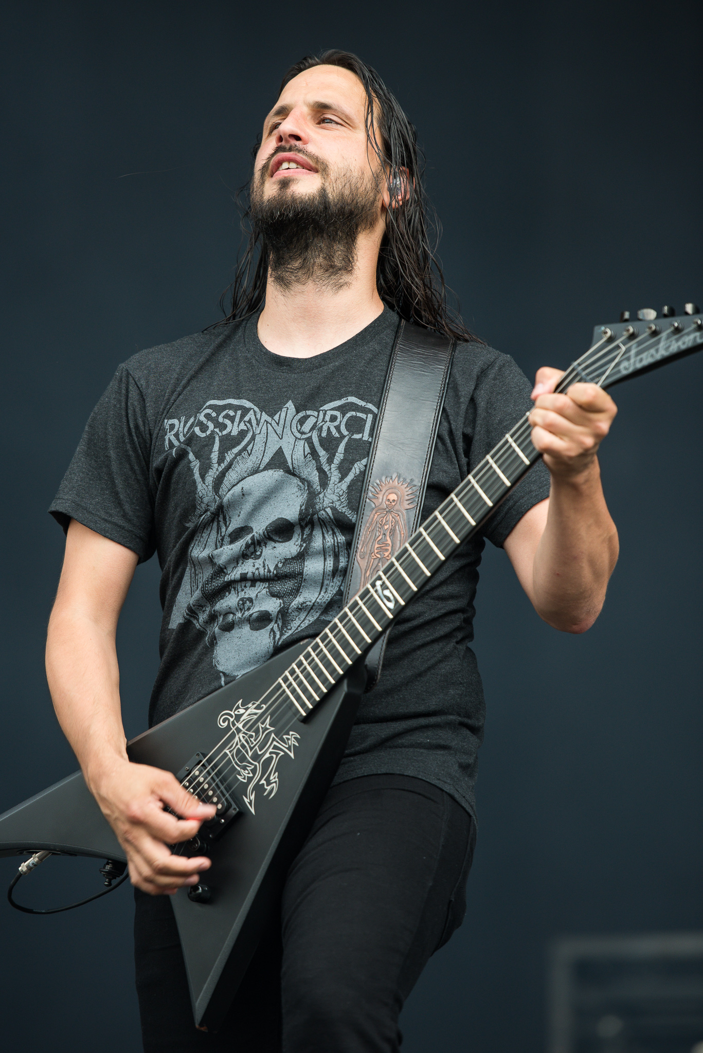 ARGO-Konzerte,Christian Andreu,Gojira,Konzert,Livekonzert,Livemusik,Musik,RiP,Rock im Park 2017,Zeppelin Stage